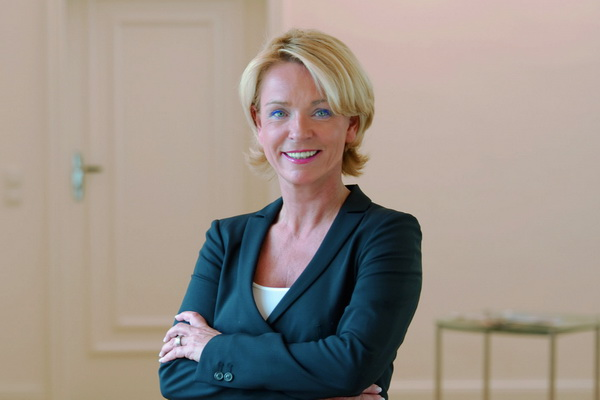 Sachverständige und Expertin der Sendung Kunst und Krempel des Bayerischen Rundfunks (BR)